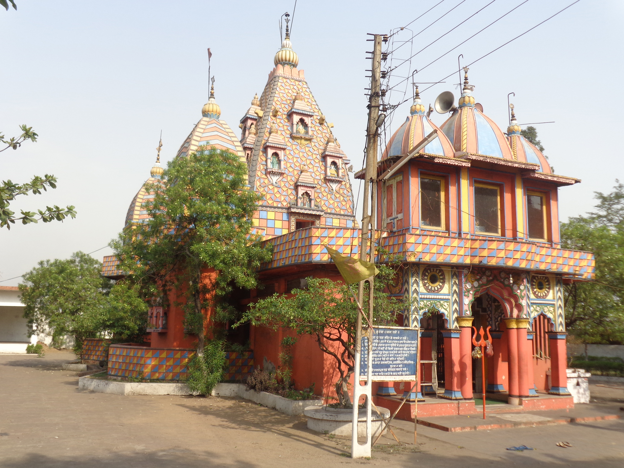 muktheshwar shiv mandir is a shakthi peeth 37 km away from raipur in bilaspur high way